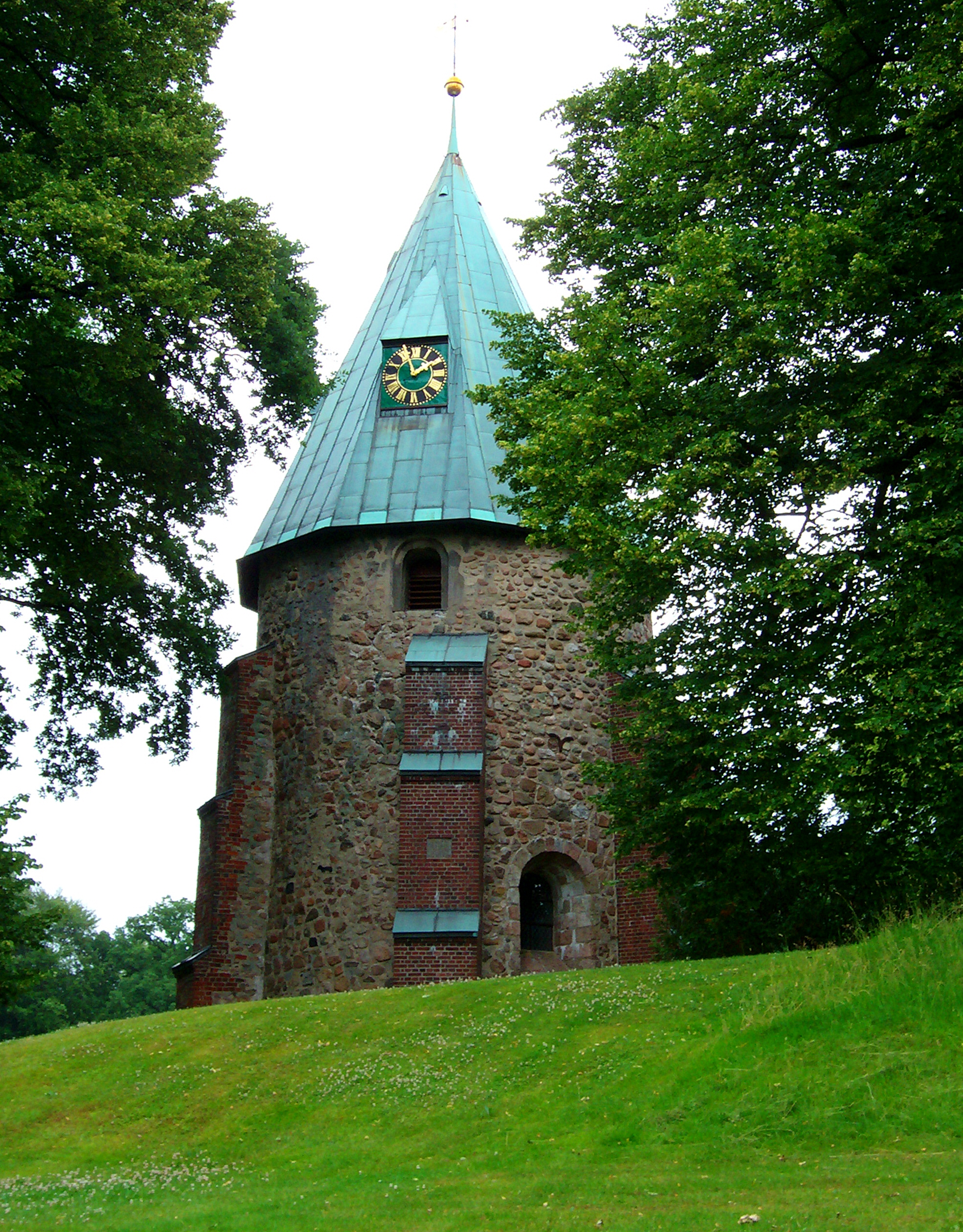 Romanische Kirche St.-Peter-und-Paul erbaut um ca. 1200 in Betzendorf bei Amelinghausen, Landkreis Lüneburg.